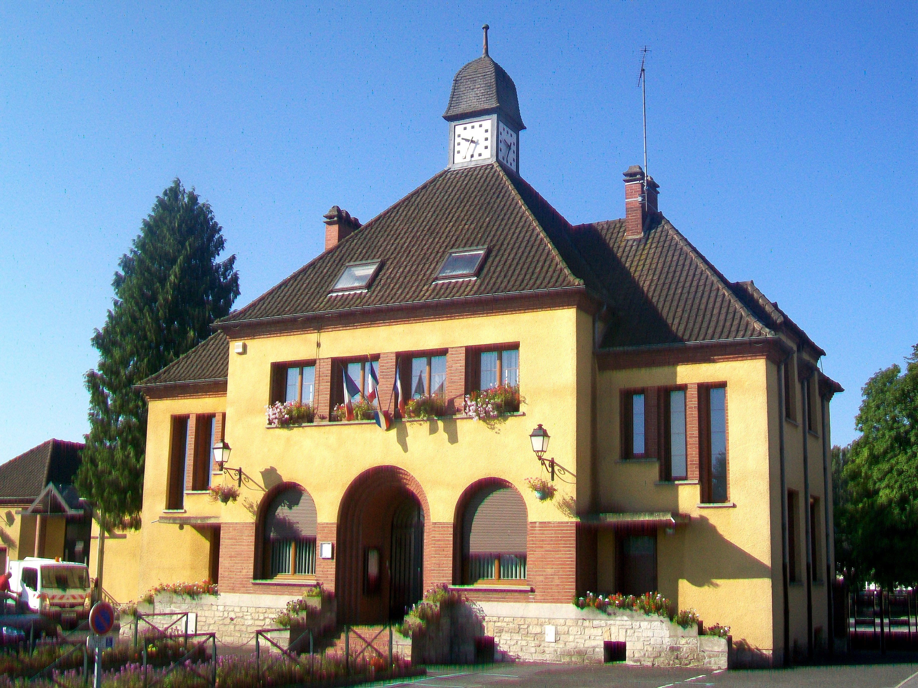 La mairie de Rieux, rue Jean-Carette.